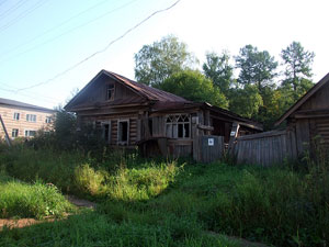 Дом Николая Гашева в ПГТ Успенский